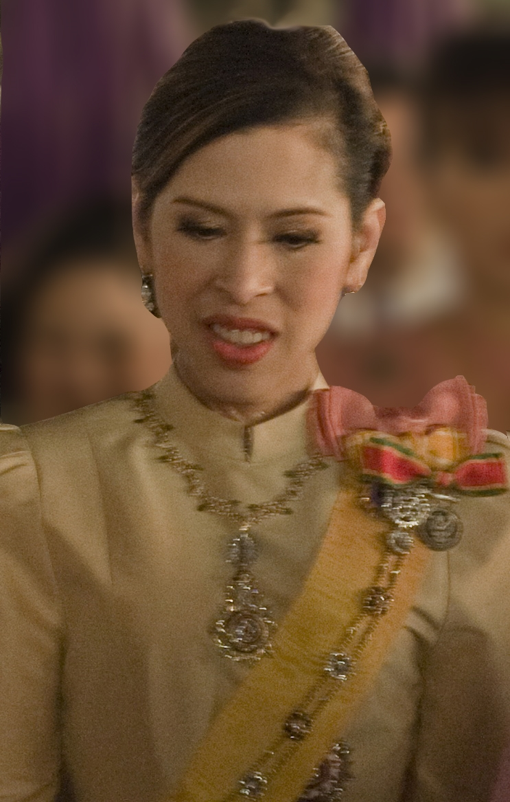 นายกรัฐมนตรี และภริยา เฝ้าฯ รับเสด็จ สมเด็จพระเทพรัตนราชสุดาฯ สยามบรมราชกุมารี เสด็จพระราชดำเนินพร้อมด้วยพระบรมวงศานุวงศ์ในงานสโมสรสันนิบาตเฉลิมพระเกียรติพระบาทสมเด็จพระเจ้าอยู่หัว เนื่องในโอกาสมหามงคลเฉลิม พระเกียรติพระชนมพรรษา วันอังคารที่ 7 ธันวาคม พ.ศ.2553 (Photographer attached to the Prime Minister of the Kingdom of Thailand : Peerapat Wimolrungkarat / พีรพัฒน์ วิมลรังครัตน์) @is50mm